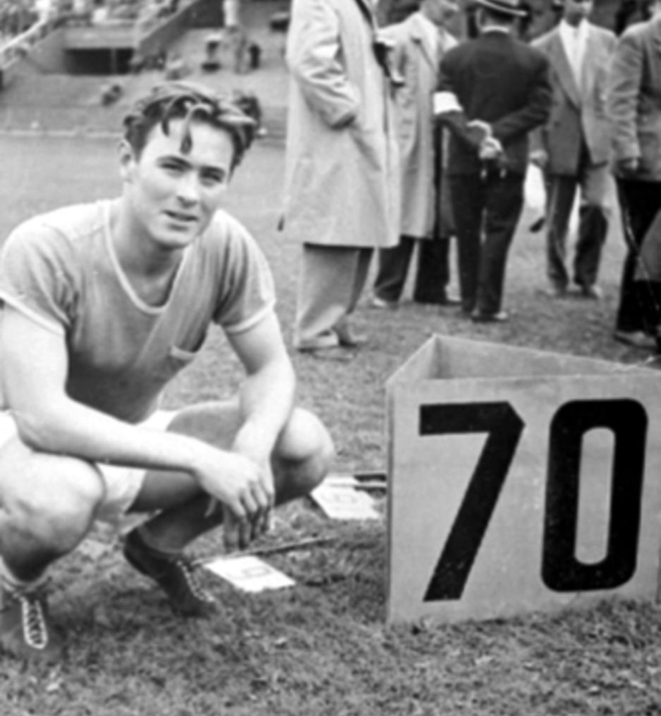 Egil Danielsen after throwing javelin over 70 m in Oslo